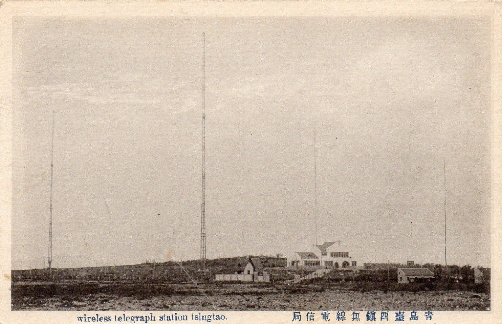 青岛台西镇无线电信局